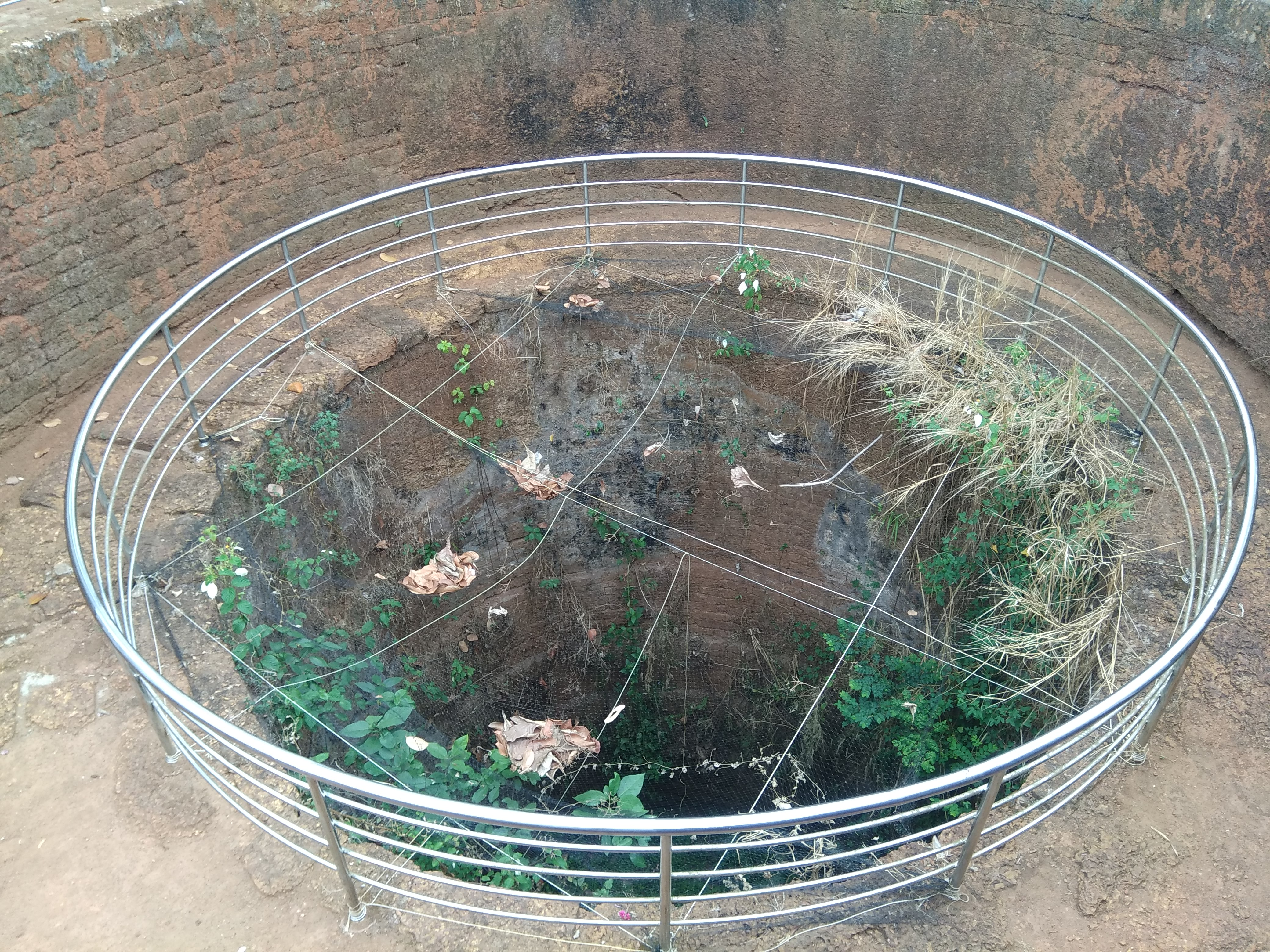 Mamankam Mamankam monument at Thorunavaya